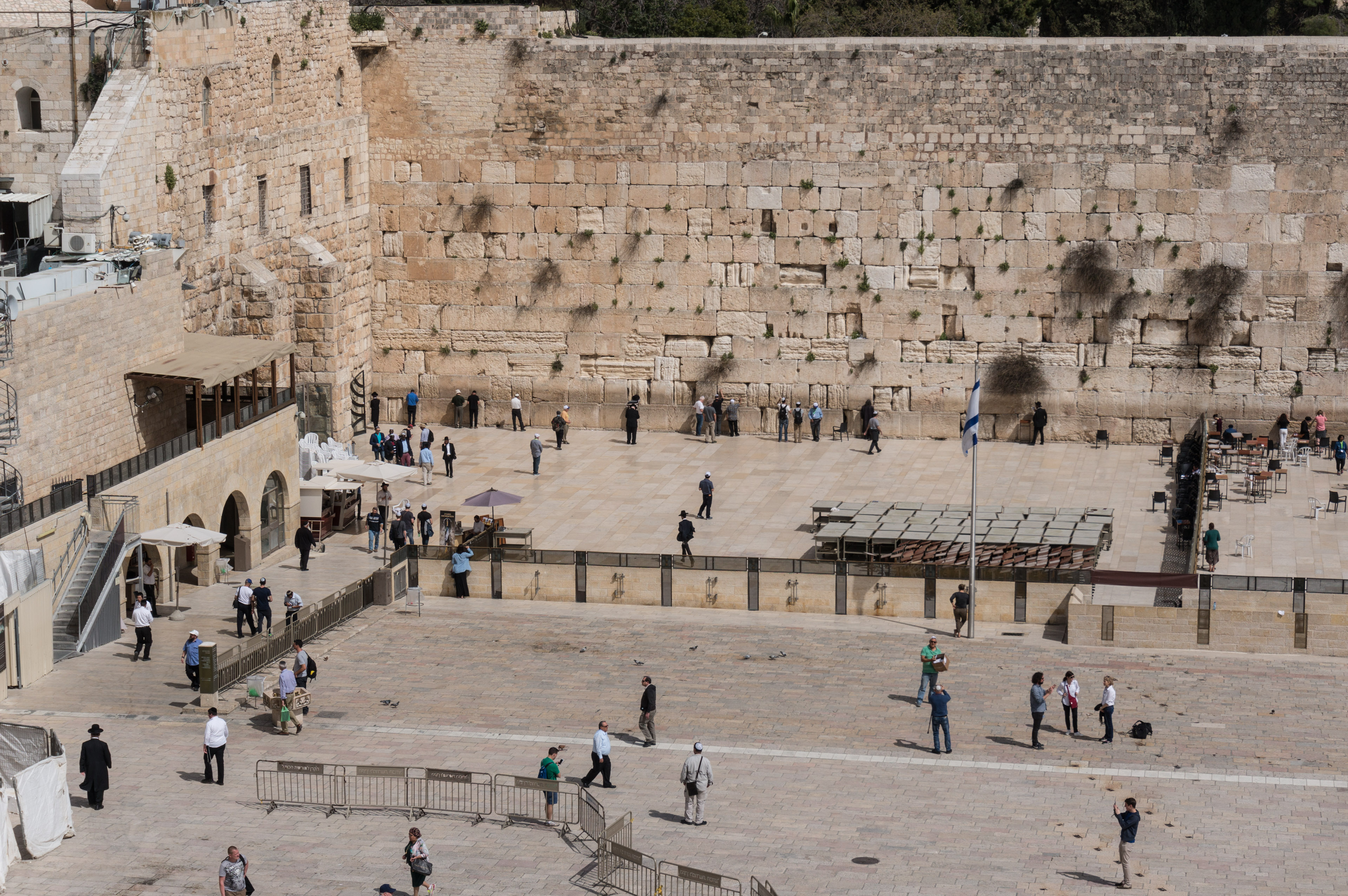 DSC06575.jpg Jerusalem